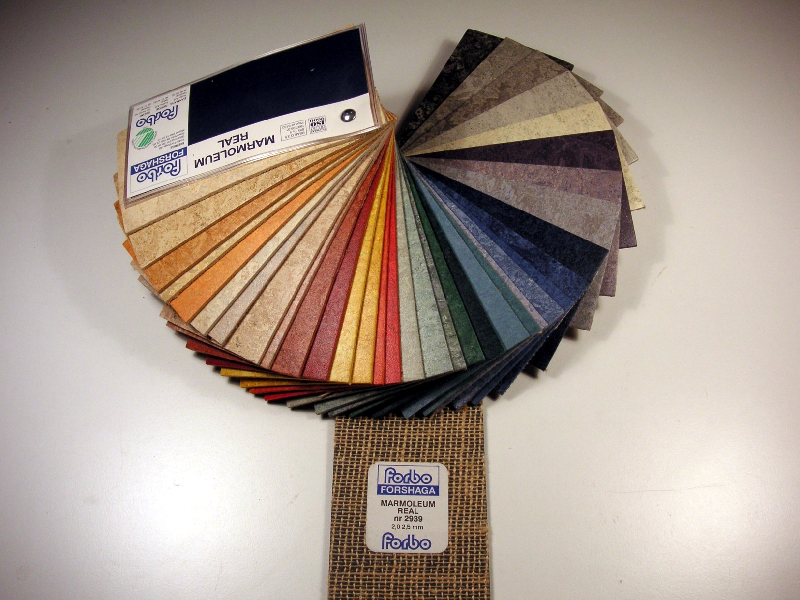 Linoleum